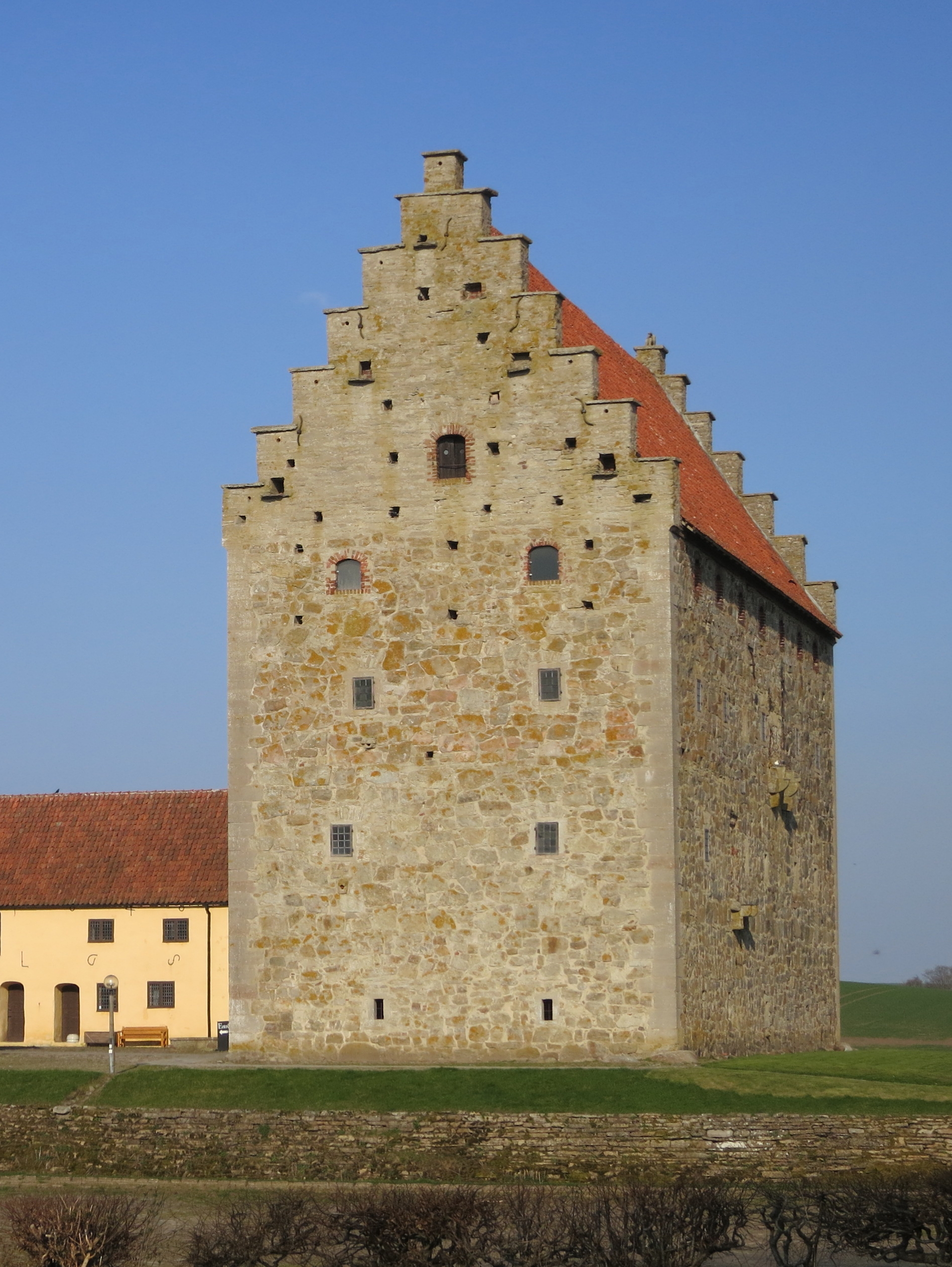 Glimmingehus 2013